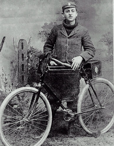 Heinrich Horstmann 1897, veröffentlicht auf etwas zugeschnitten